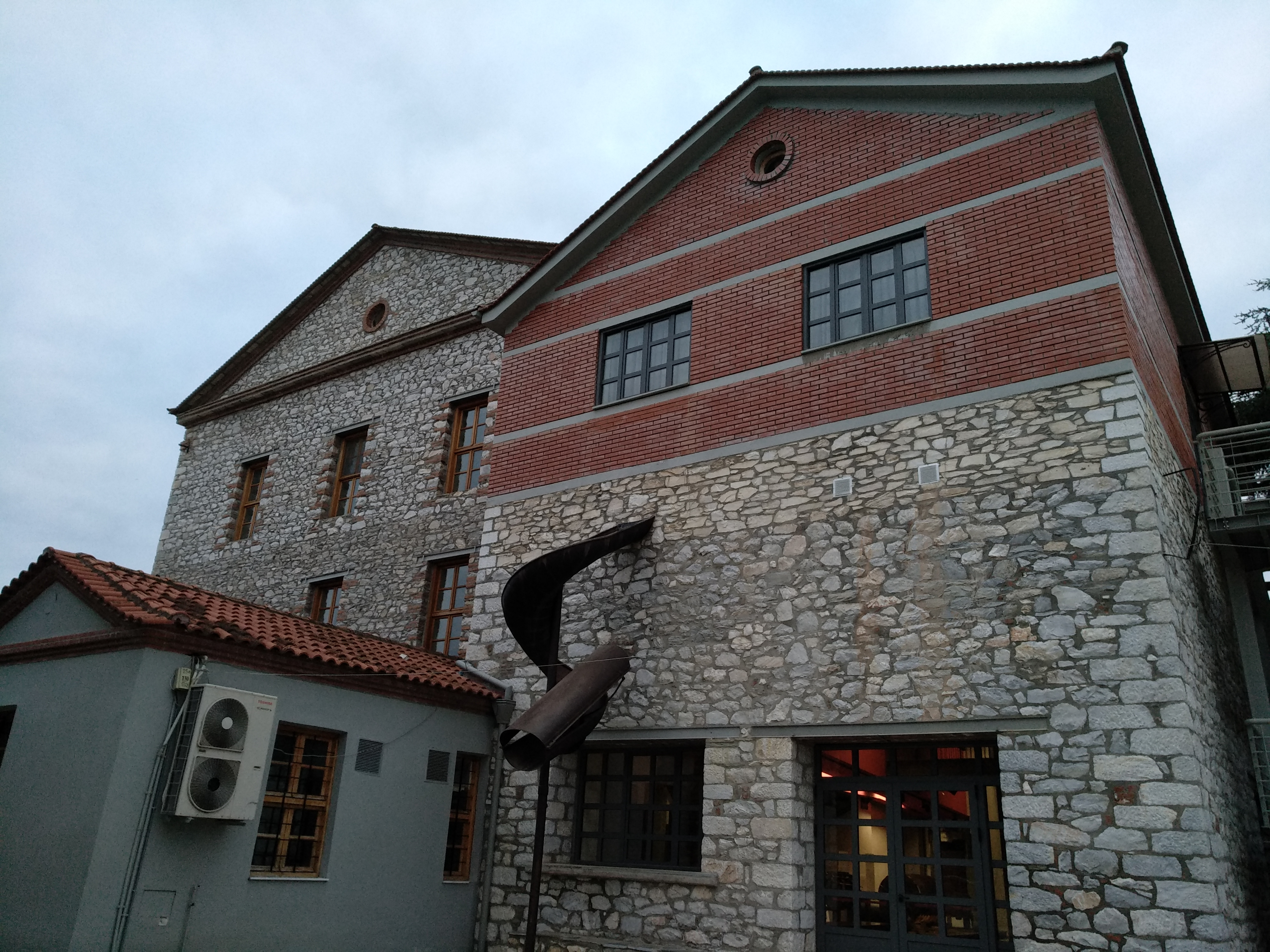 Λάρισα - μύλος Παππά-01